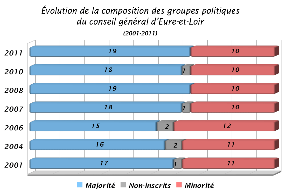 Composition du conseil général d'Eure-et-Loir (janvier 2011)